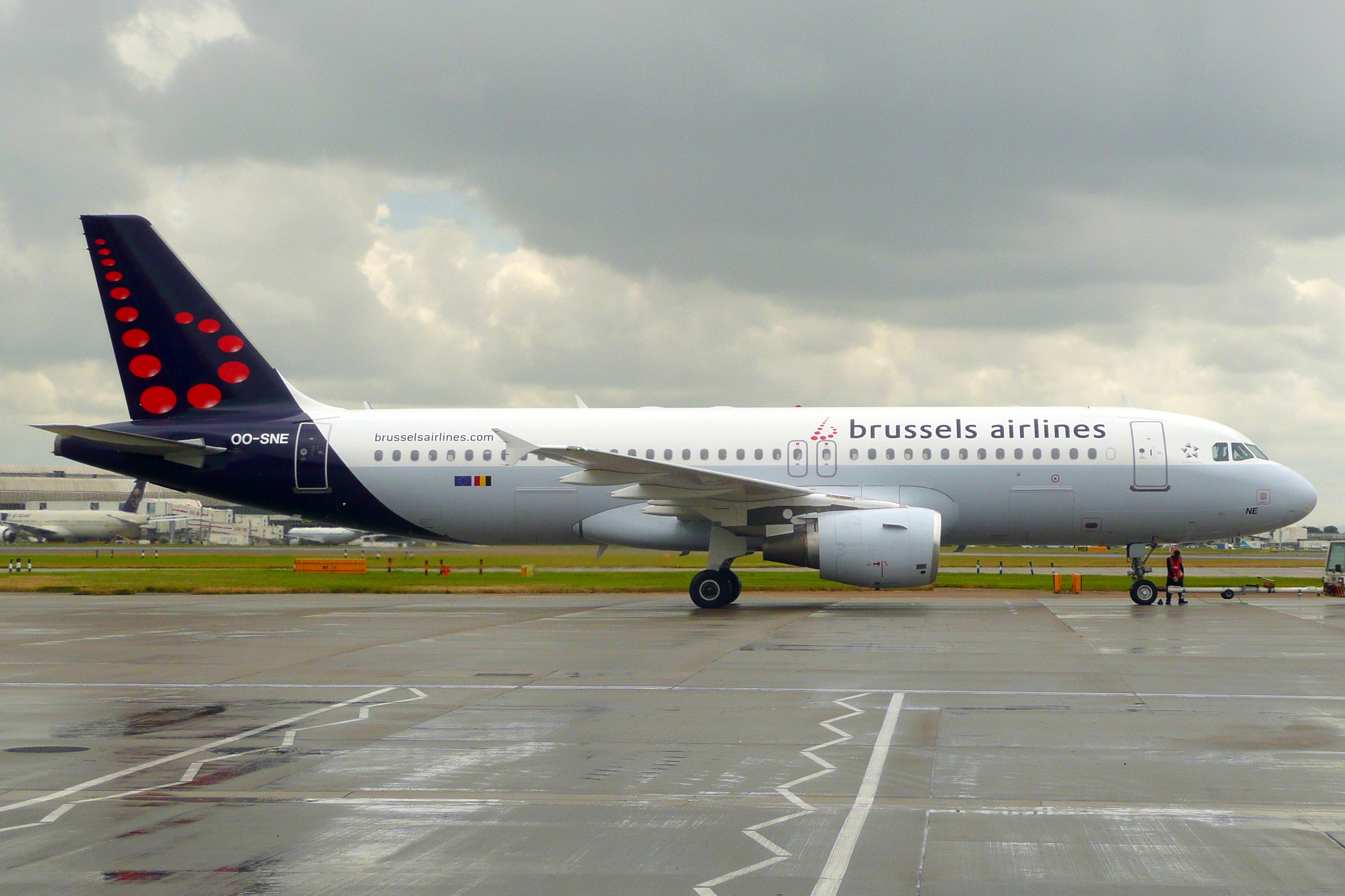 OO-SNE 12072016LHR